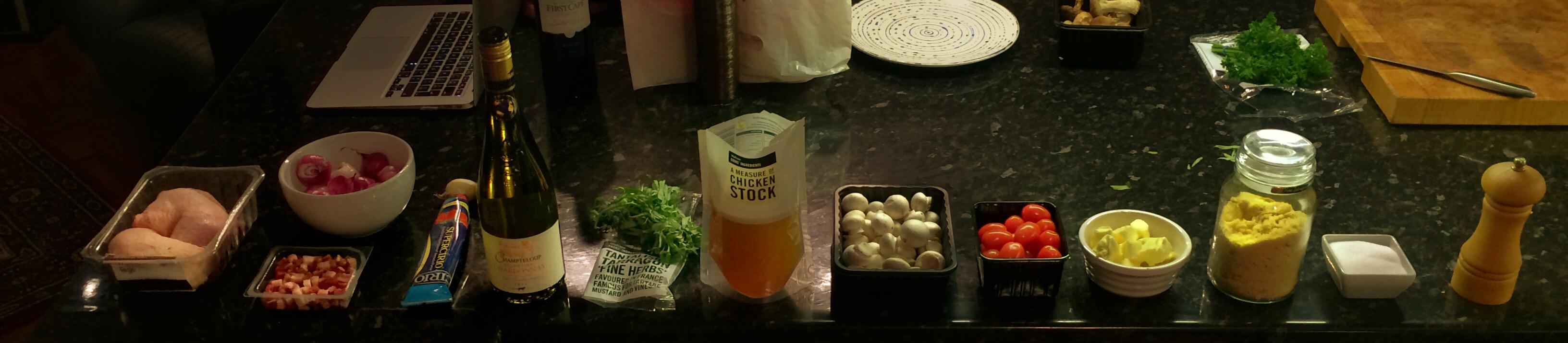 Poulet sauté chasseur ingredients